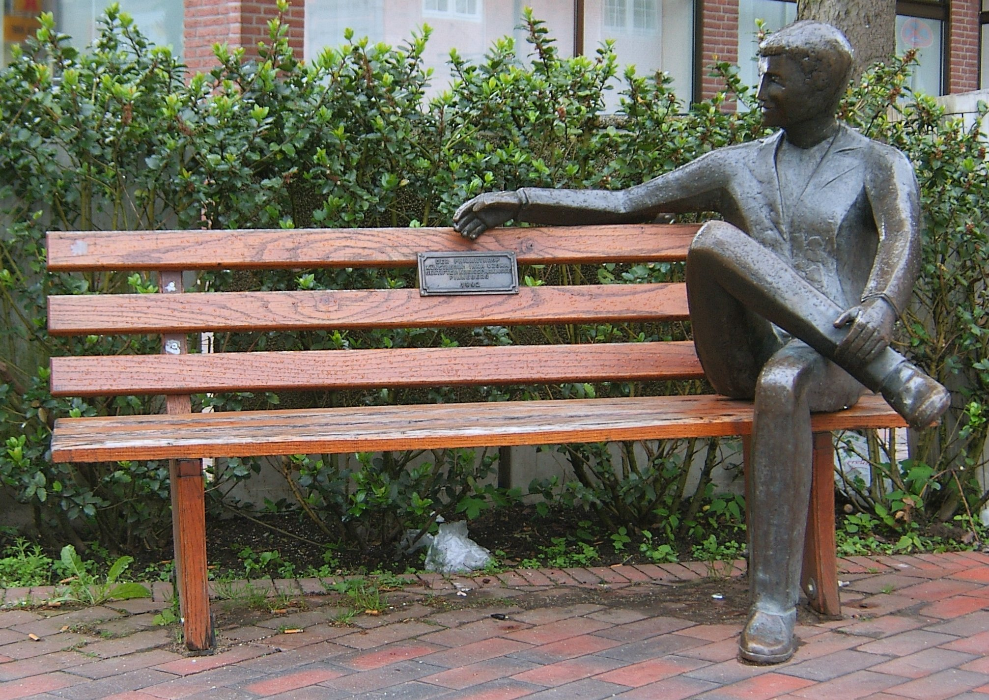 Pinneberg, „Der Philanthrop“ (Künstlerin Inar Czora, 1992)